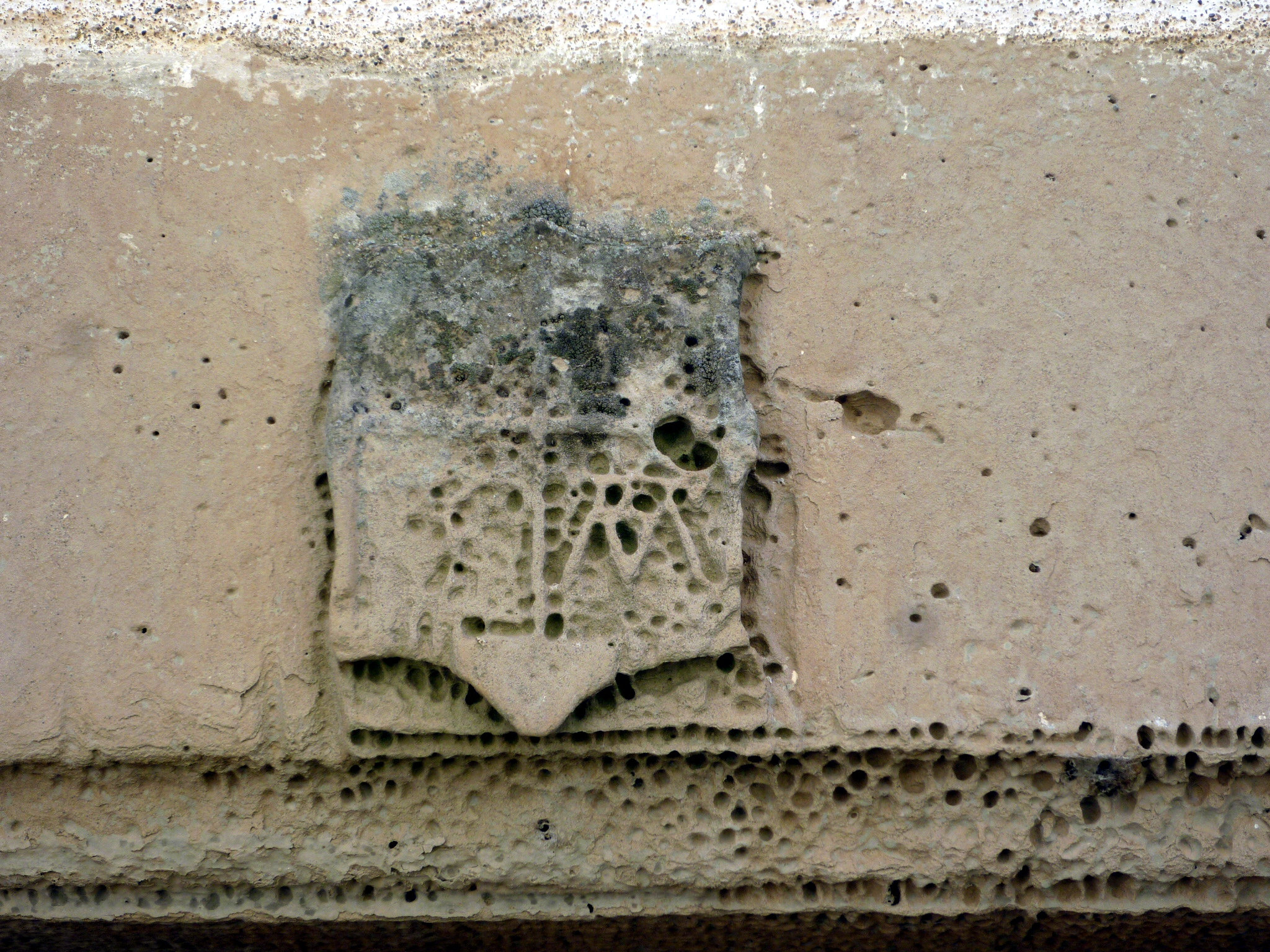 Capella de Santa Llúcia de la Rubiola (Veciana): llinda de la portada